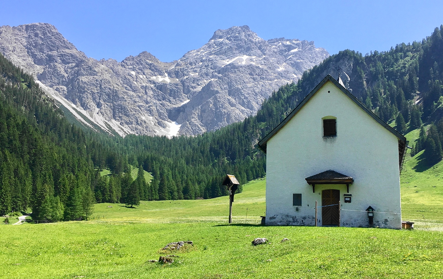 Flur-/Wegkapelle, hl. Rochus